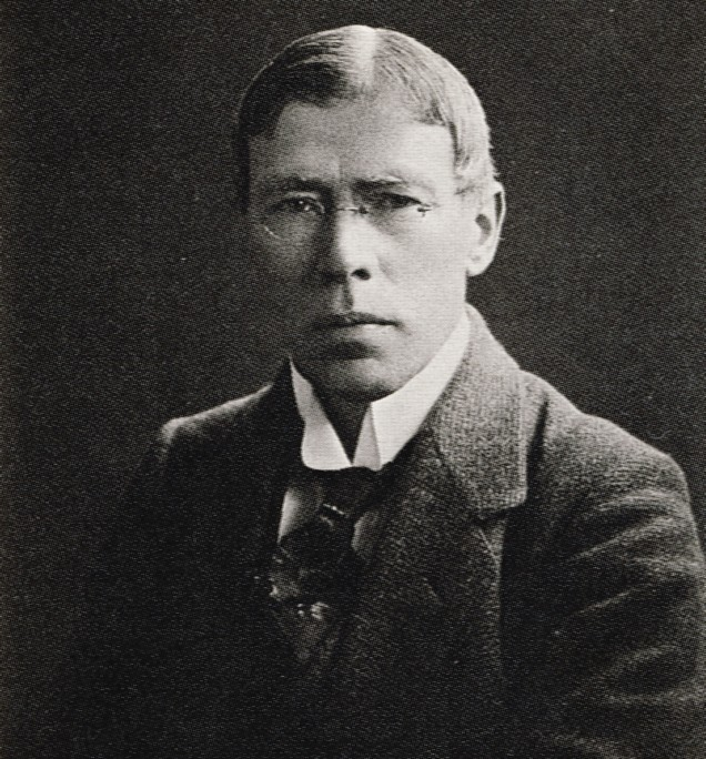 Fotografen Herman Hamnqvist (självporträtt)